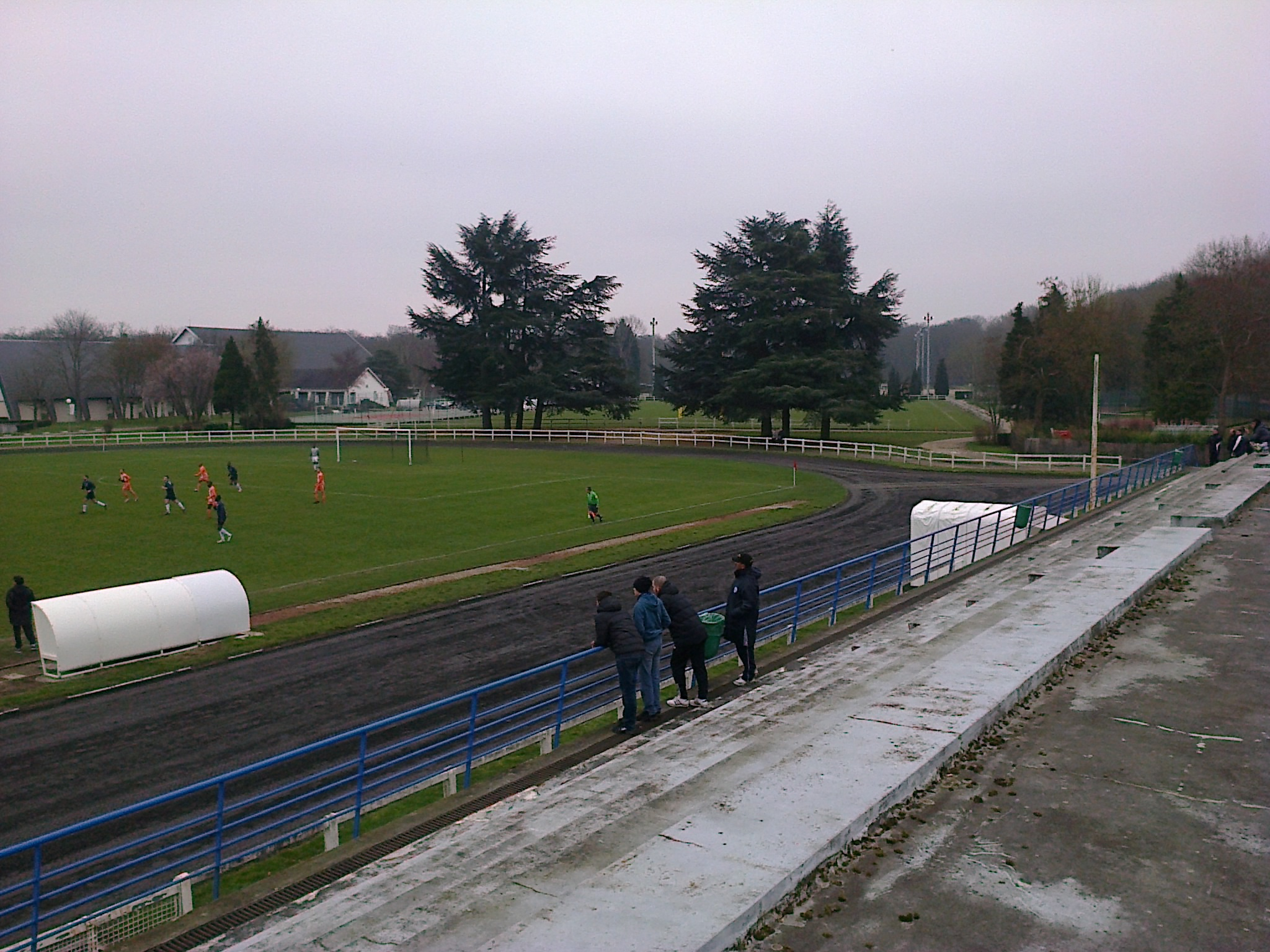 Le Stade Marcel-Bec de Meudon lors du match Boulogne-Meaux du 10 mars 2013